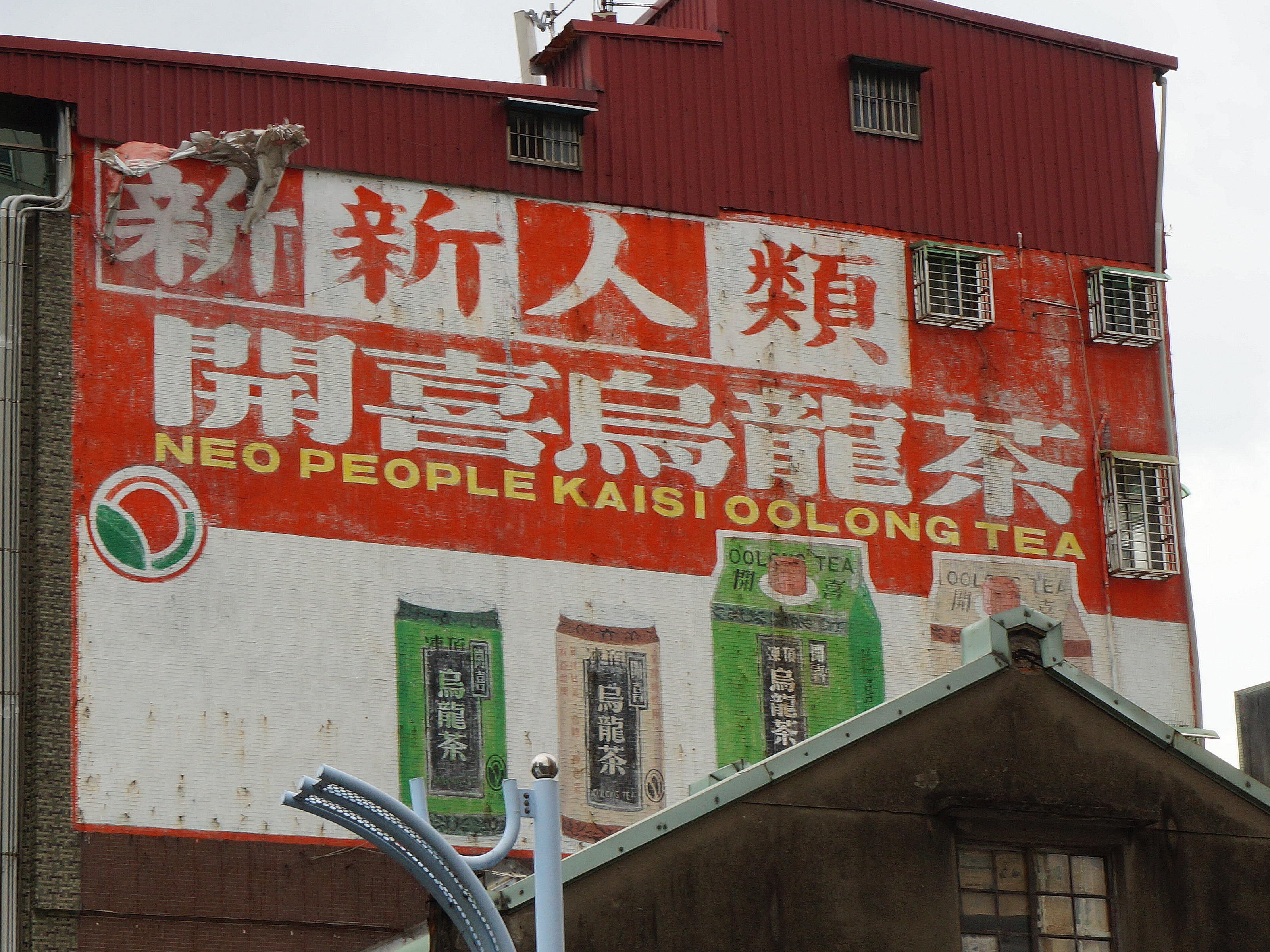 臺北市中山區中山北路一段，信喜實業「開喜烏龍茶」廣告壁畫，廣告詞：「新新人類，開喜烏龍茶。」